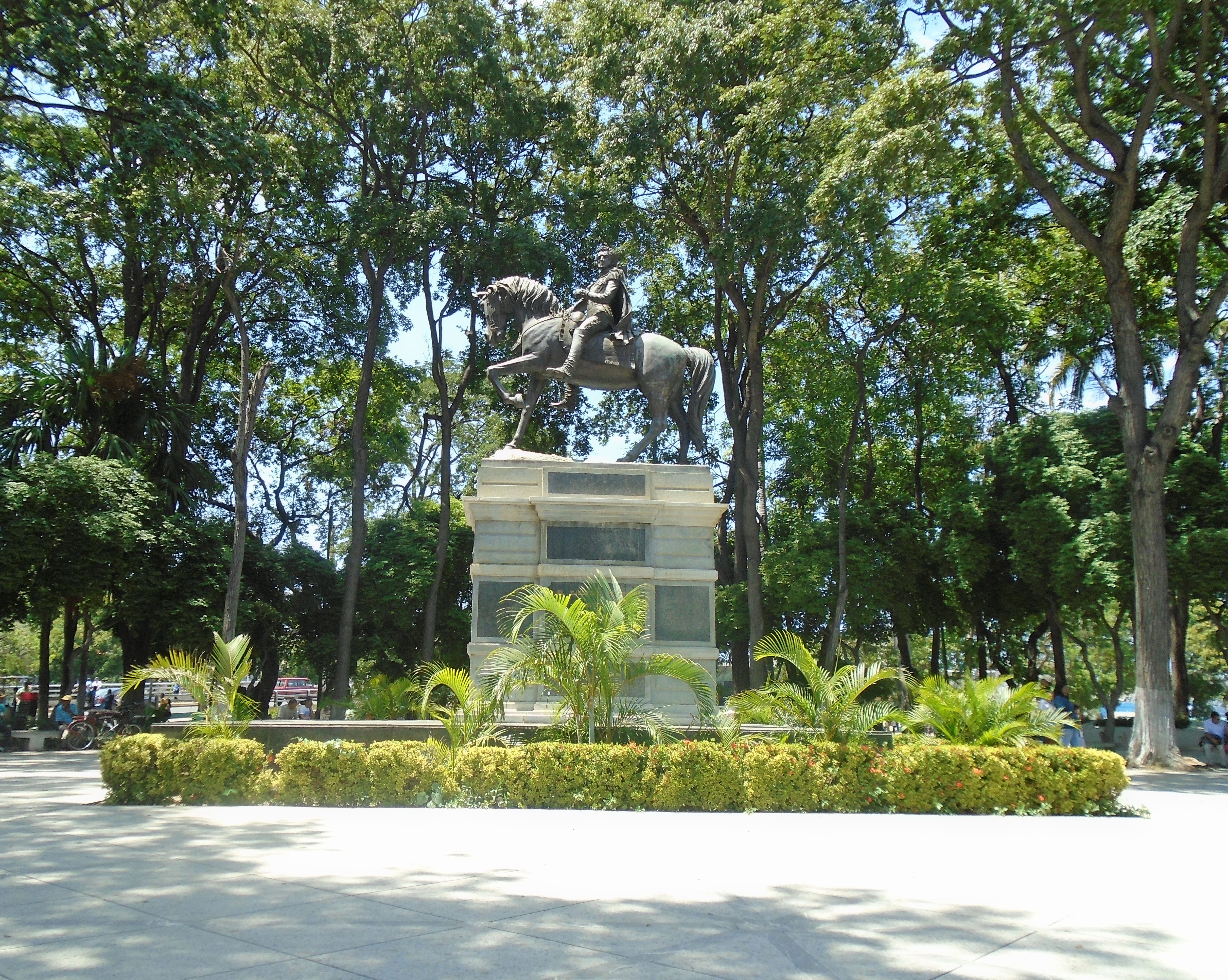 Plaza Ayacucho, Cumaná, Sucre, Venezuela